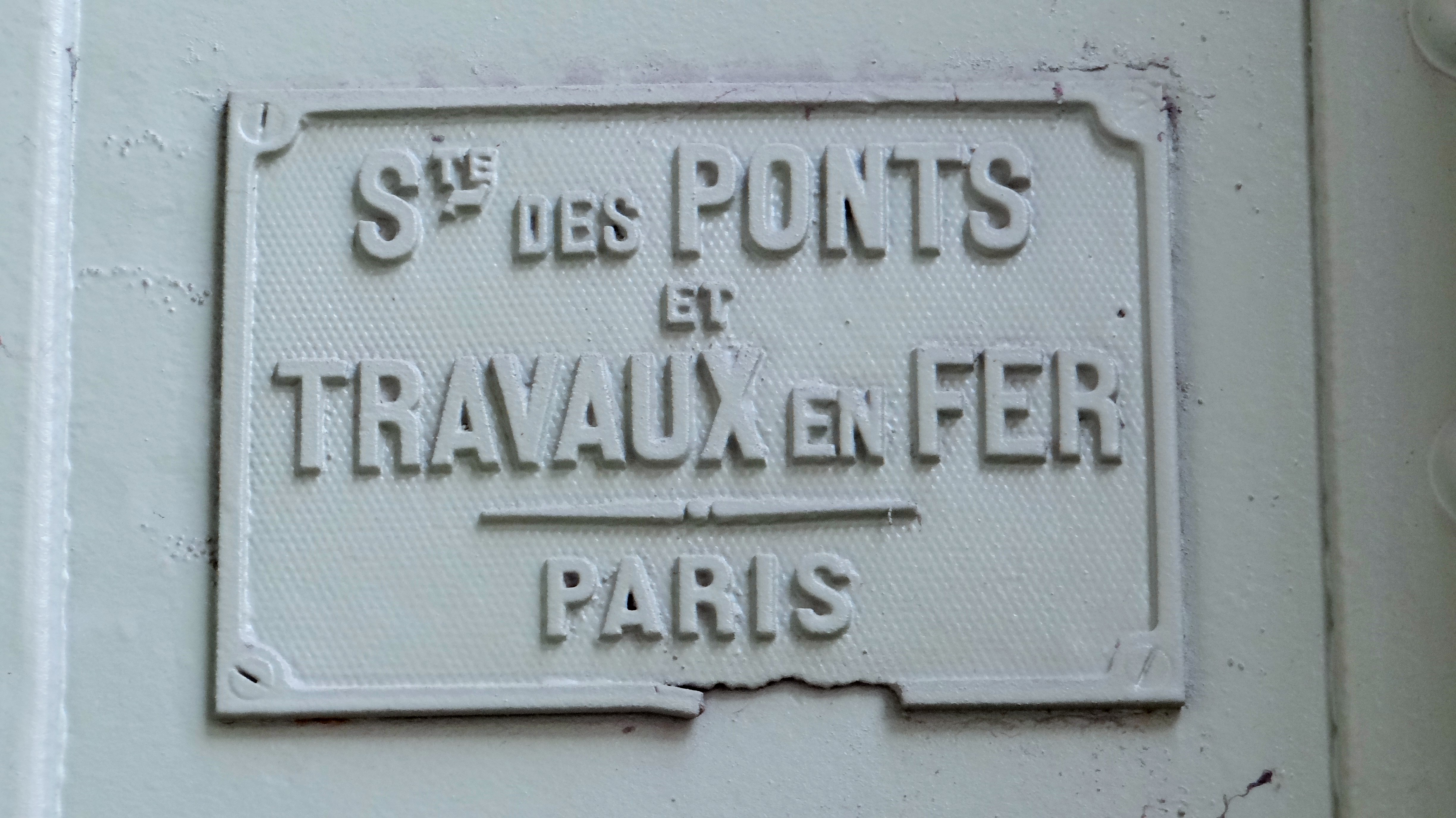 plaque constructeur sur la nef du Grand Palais "Société des ponts et des travaux en fer, Paris" .